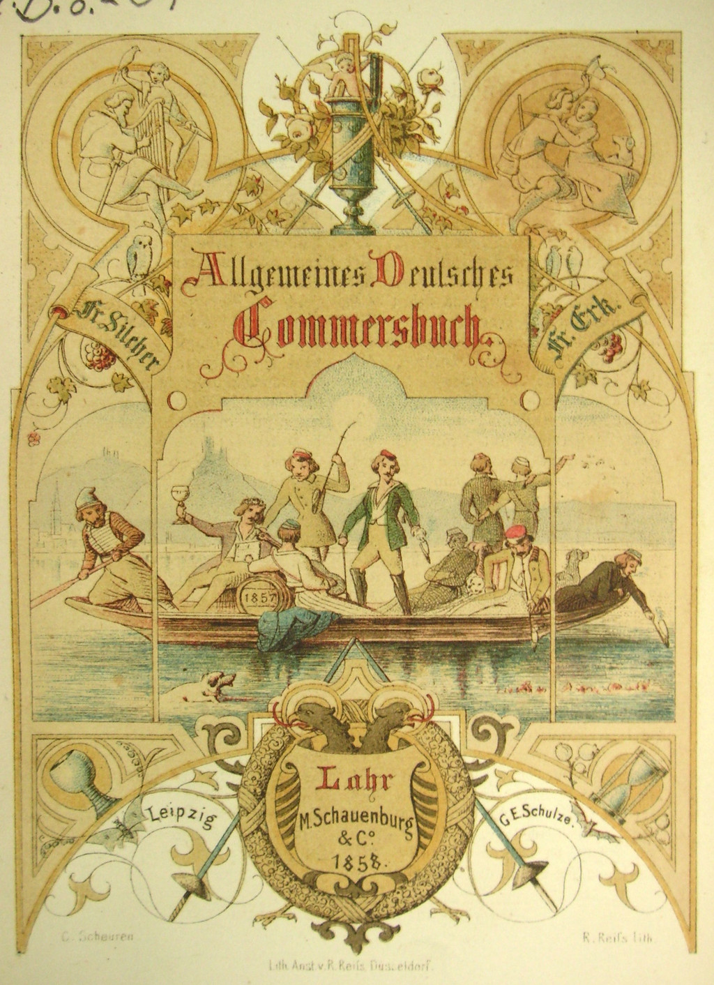 Titelbild (Lithografie) der Erstausgabe des Allgemeinen Deutschen Commersbuches